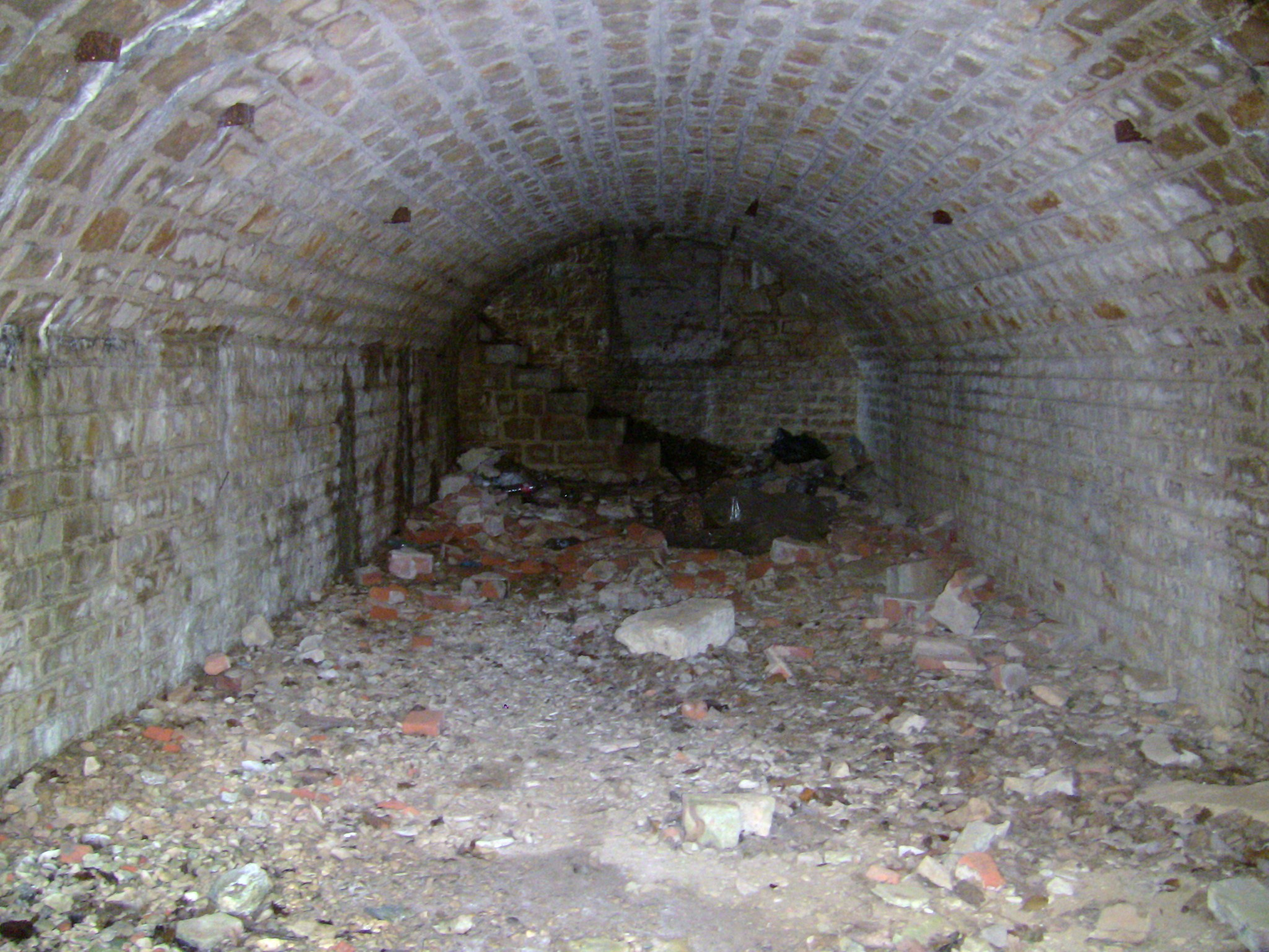 La chambre d'une traverse-abris de la batterie annexe du front sud-ouest du fort de Planoise, à Besançon (Doubs, France).